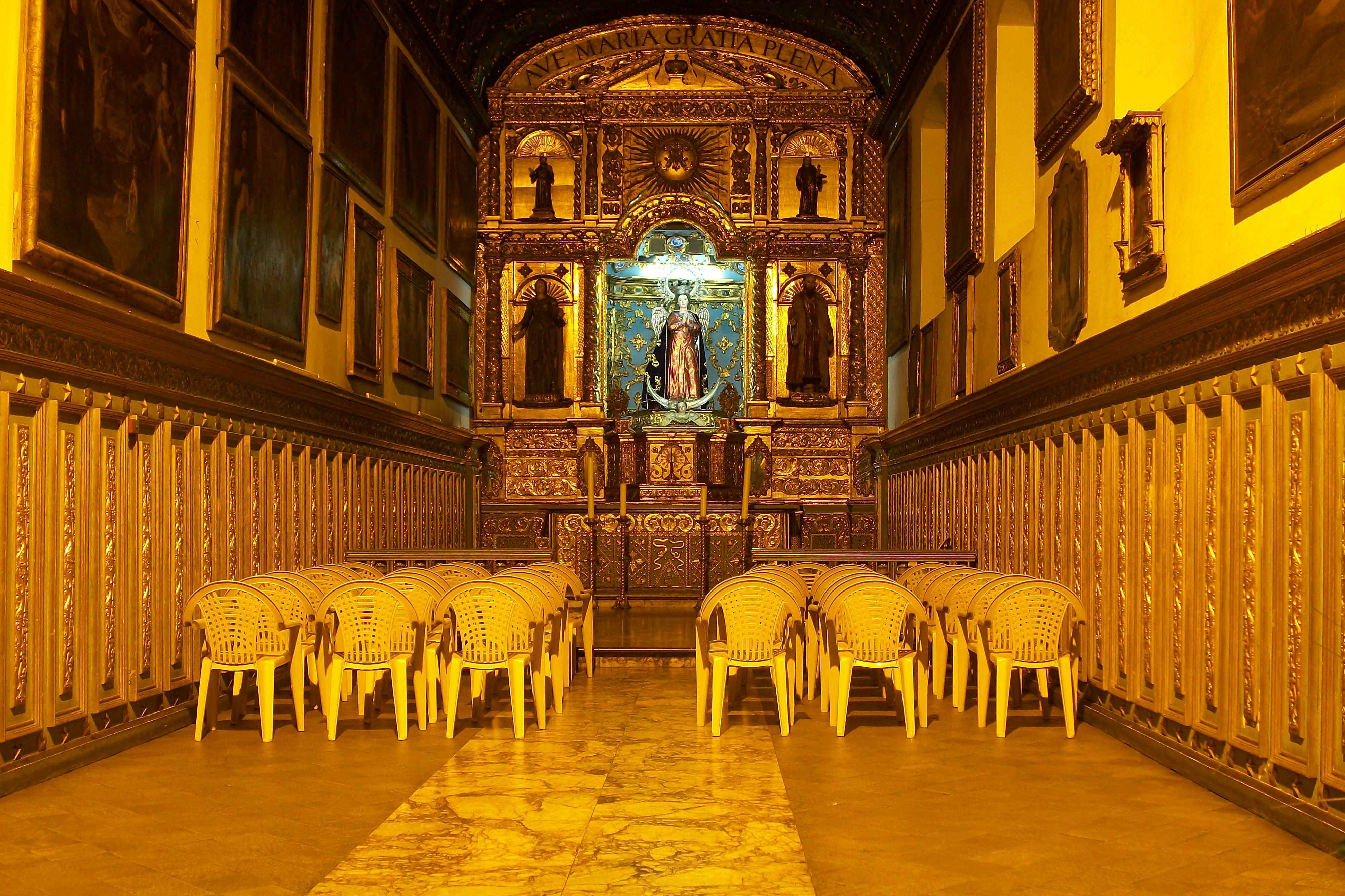 Capilla anexa de la iglesia de San Francisco en Bogotá, Colombia.